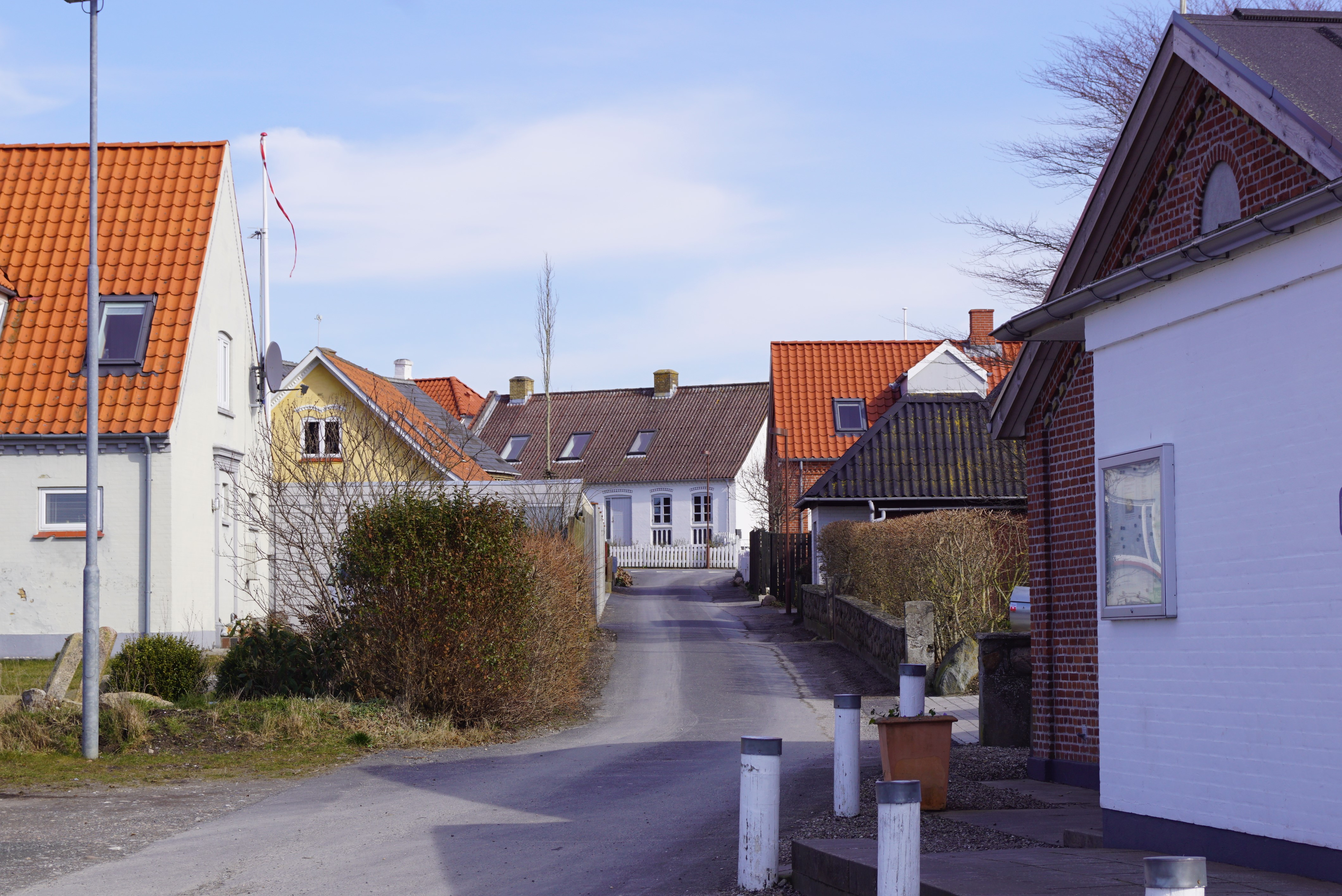 Torø Huse ved Forsamlingshuset